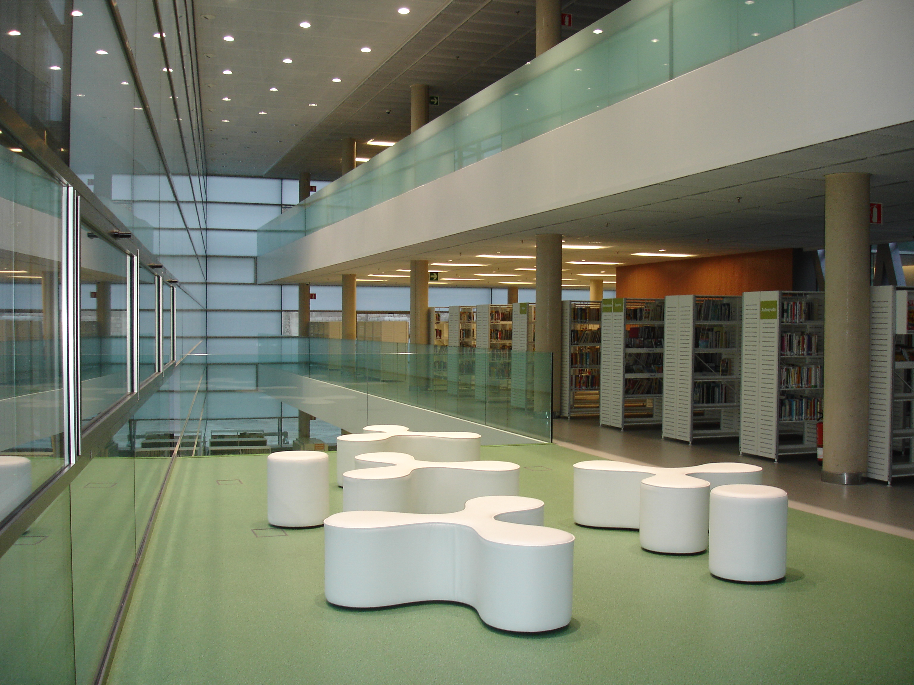 Áreas temáticas en la planta uno de la Biblioteca Pública del Estado en Burgos, España